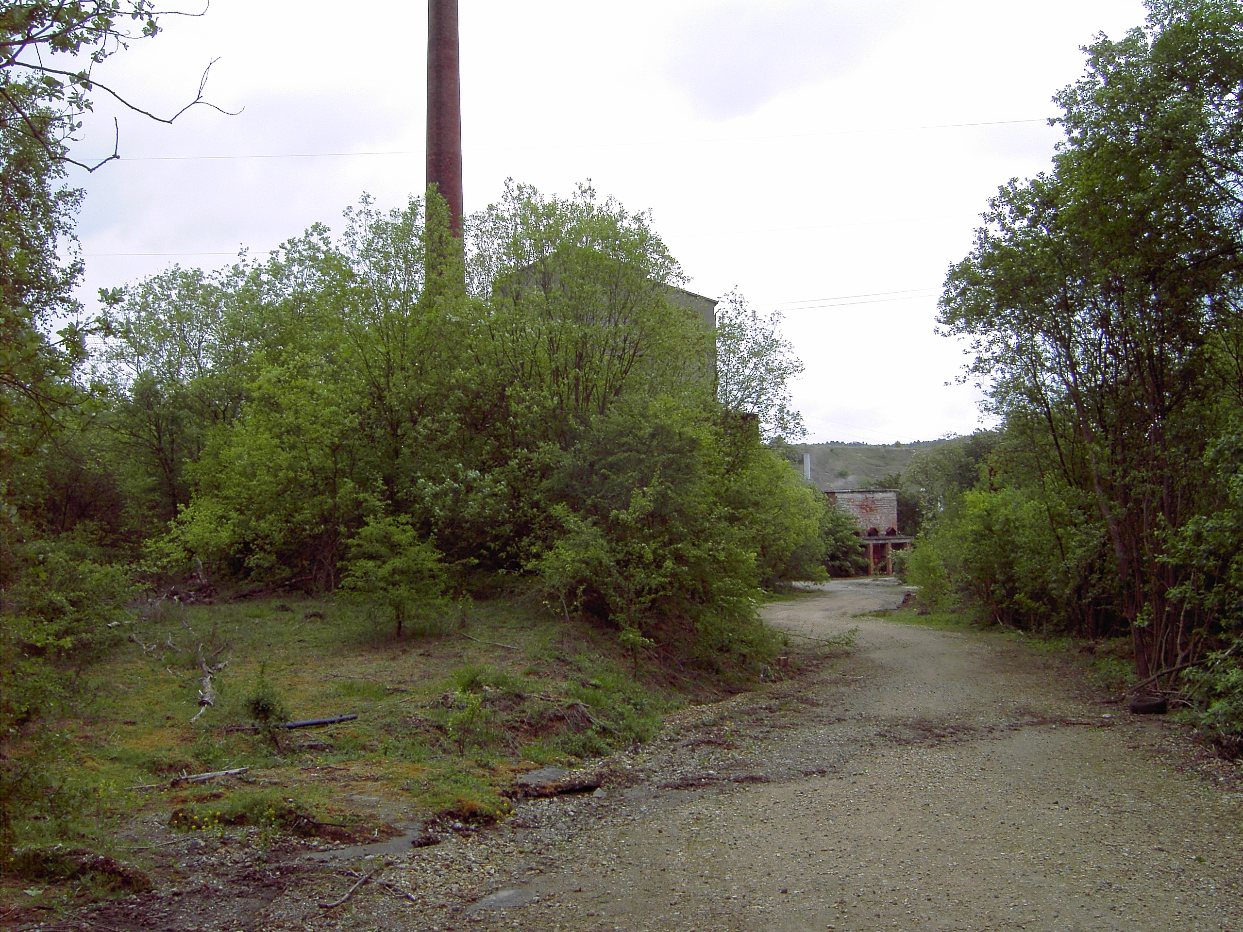 Das Bild zeigt die alte Industrieruine im jetzigen Naturschutzgebiet Bärenstein